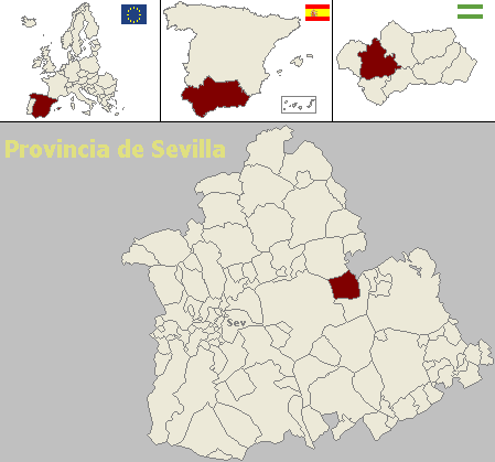 Mapa de localización del municipio sevillano de La Campana (Andalucía, España)